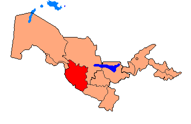 Uzbekistan - Buxoro (Bukhara) Province